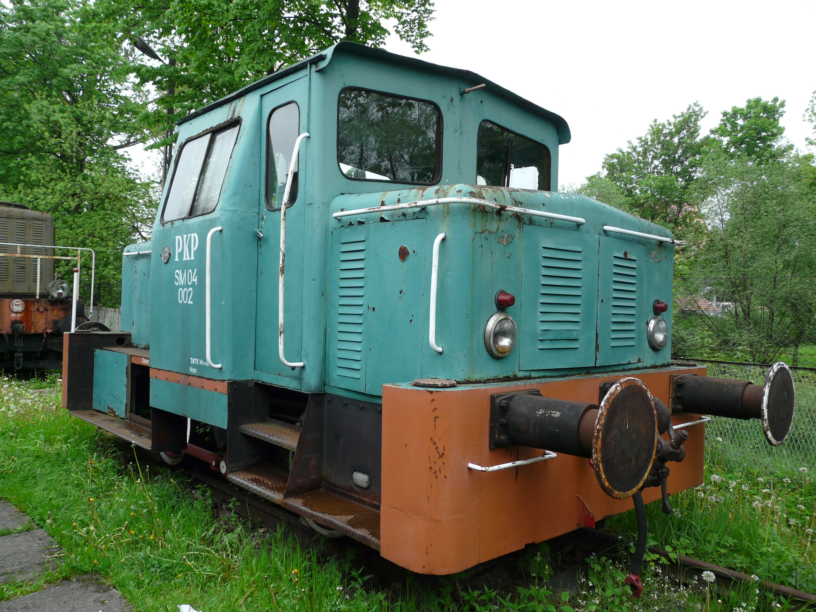 Skansen taboru kolejowego w Chabówce / Chabówka Rolling-Stock Heritage Park